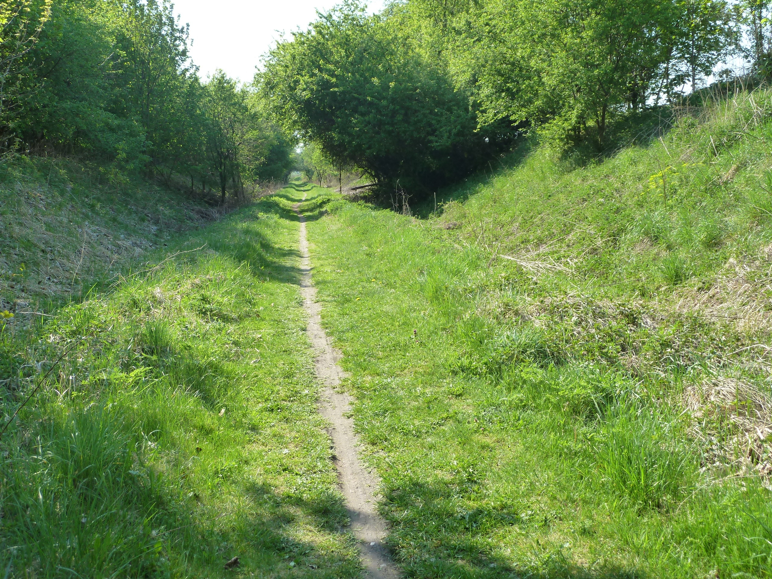 Trasse der Westhavelländischen Kreisbahn bei Ketzür